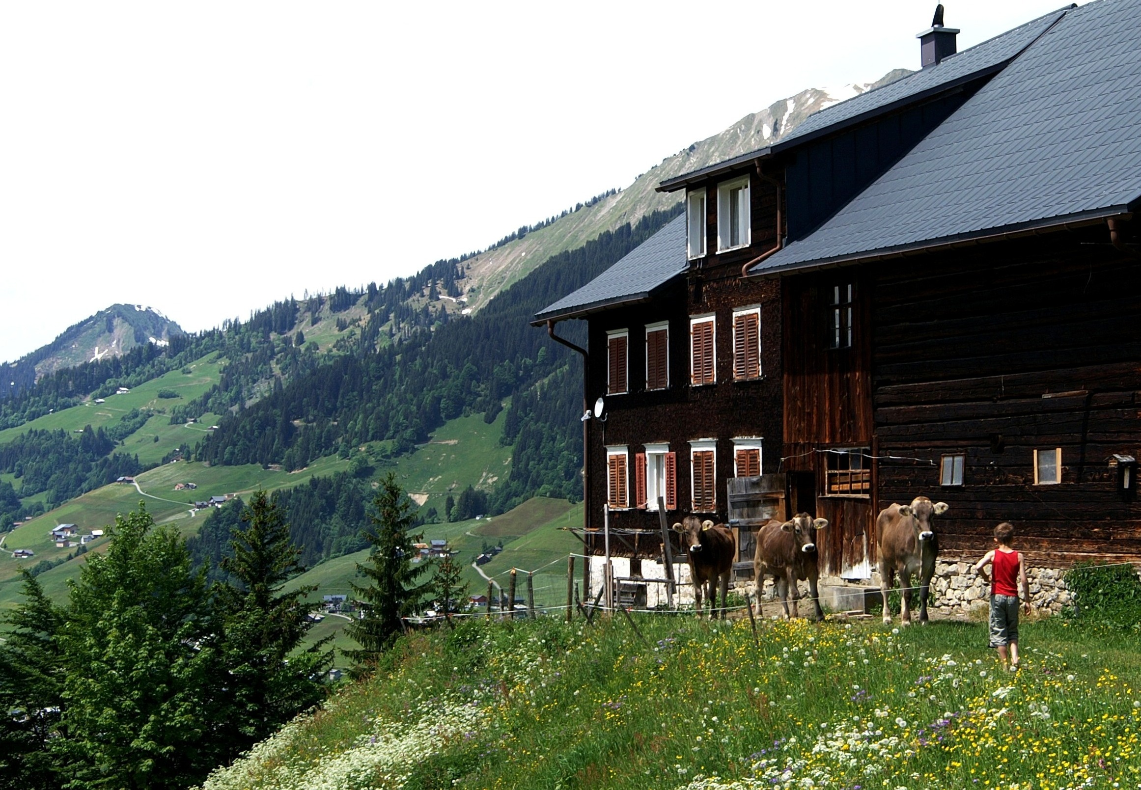 Ein Vorsäß in Seewald bei Fontanella. Die Rinder gehören zur Rasse des Braunvieh.